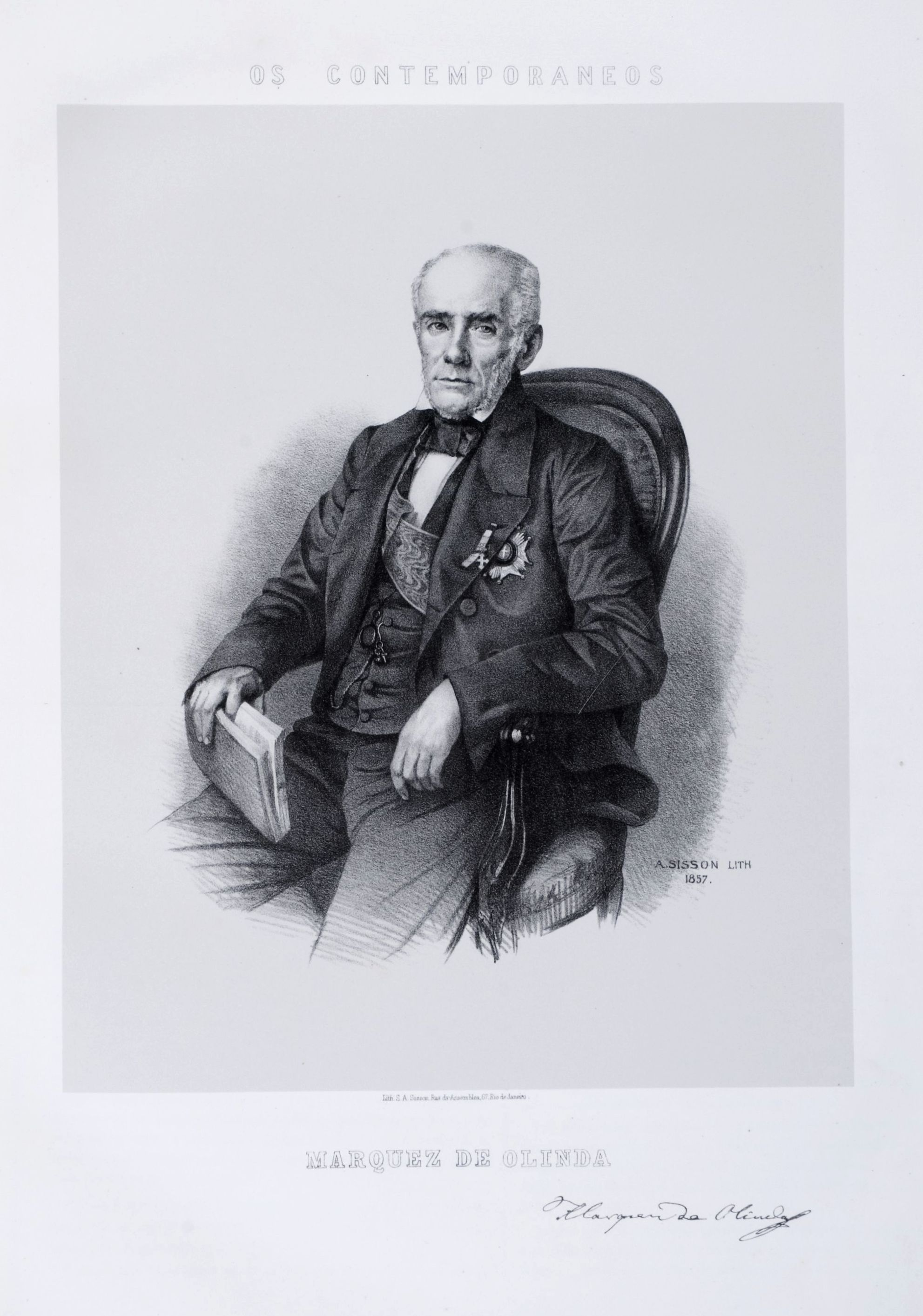 Litografia em preto e branco